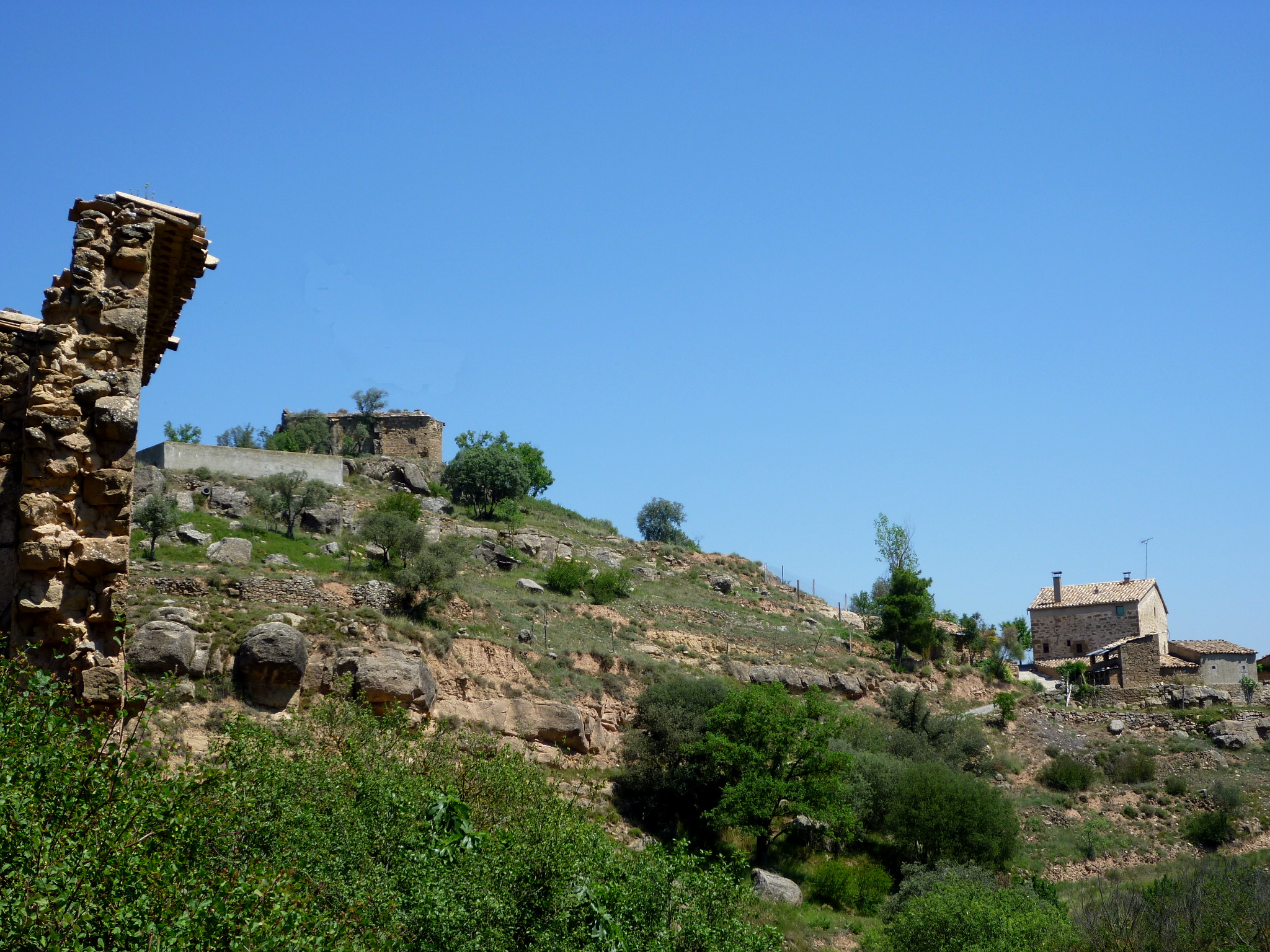 Capella de Sant Antoni de Santes Masses (Pinell de Solsonès): vista des de Santesmasses, amb cal Llobet a la dreta